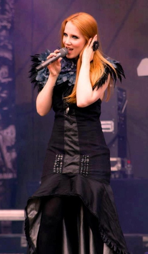 Epica at Colmar, France.